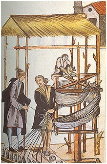 Acuarela del siglo XVIII, sobre obraje en el virreinato del Peru